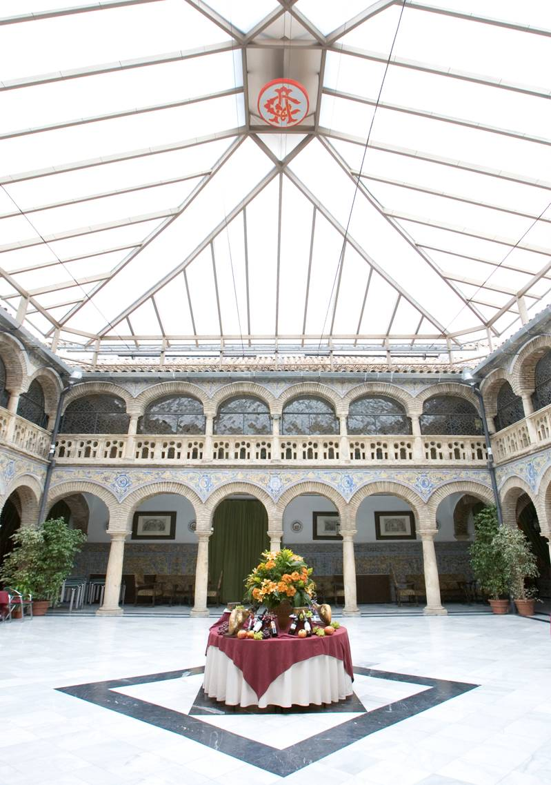 Patio del Real Círculo de la Amistad